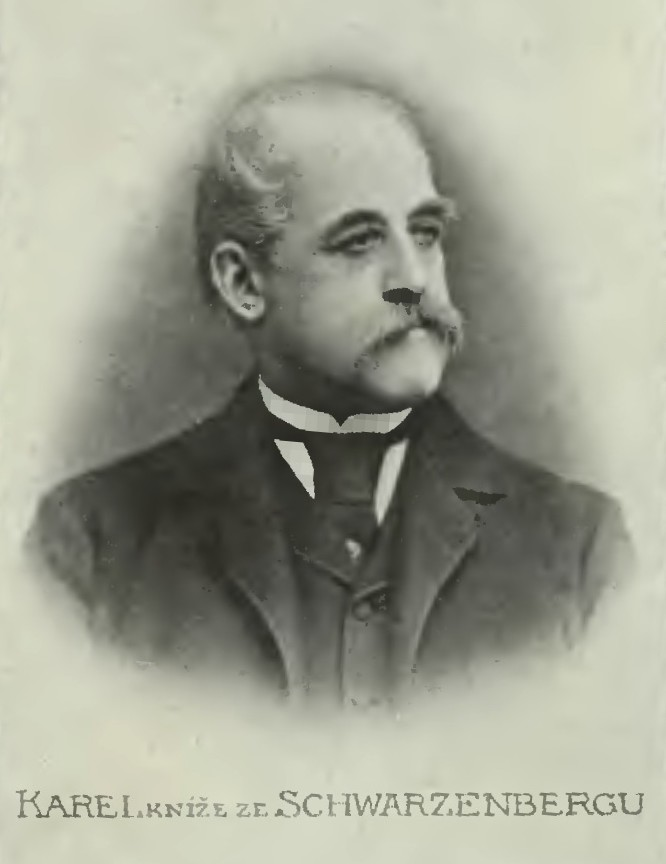 Portrét – Karel III. Schwarzenberg (1824-1904), Rakouský voják a Český politik.